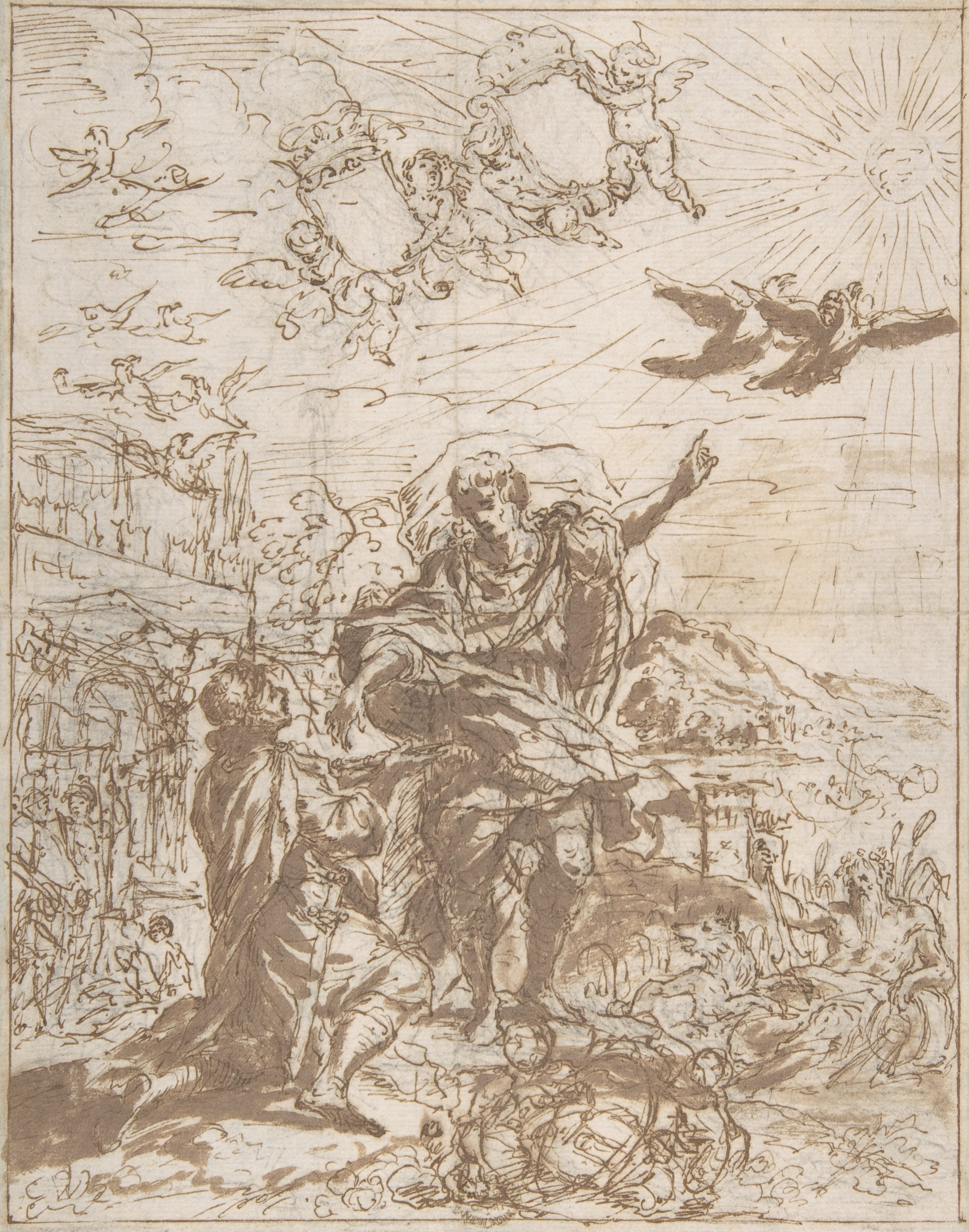 Drawing; Drawings